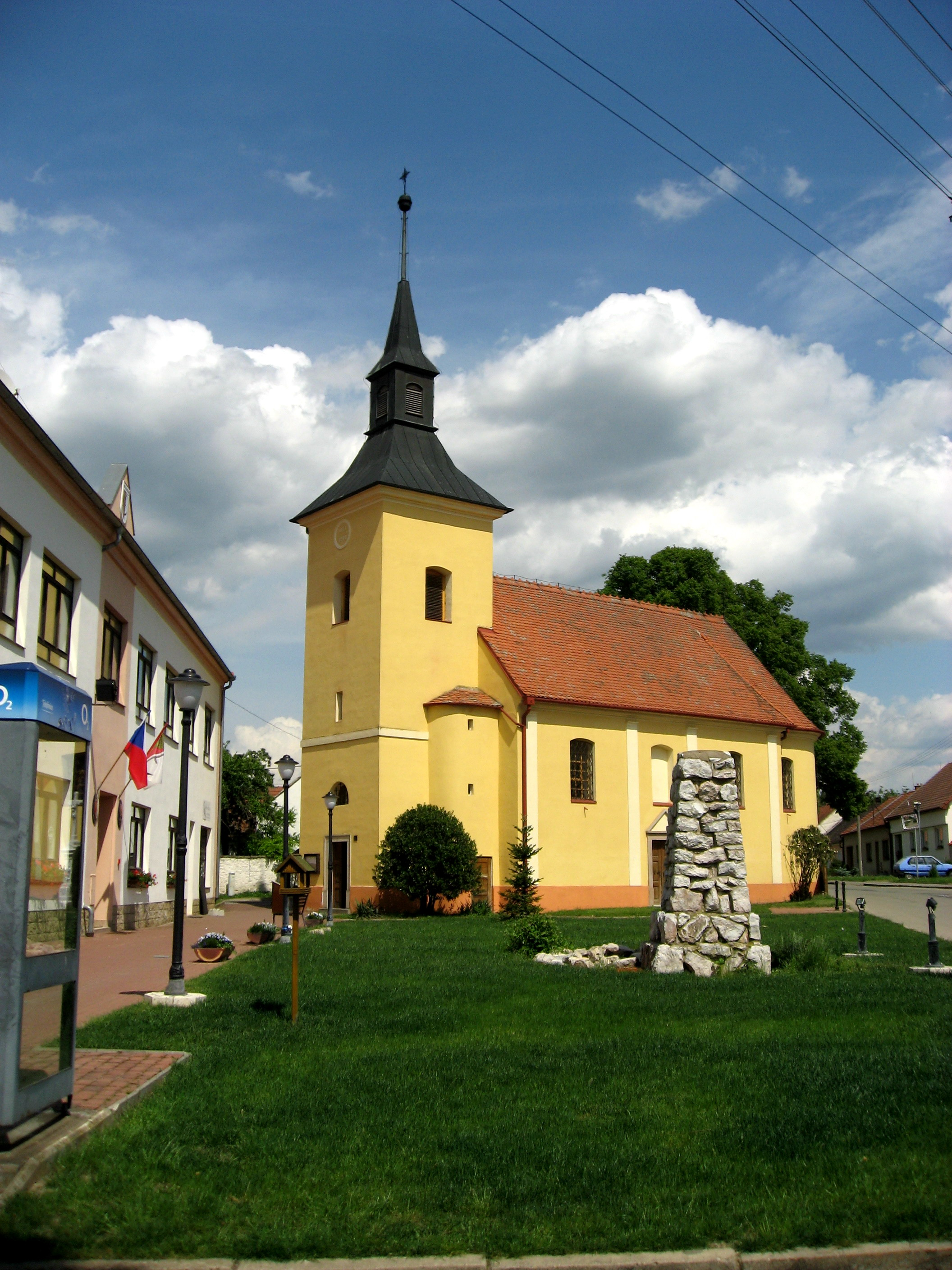 Malhostovice, kostel